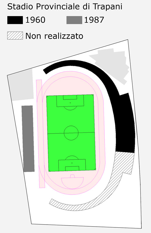 progetto del vecchio Stadio Polisportivo Provinciale di Trapani Categoria:Trapani Calcio